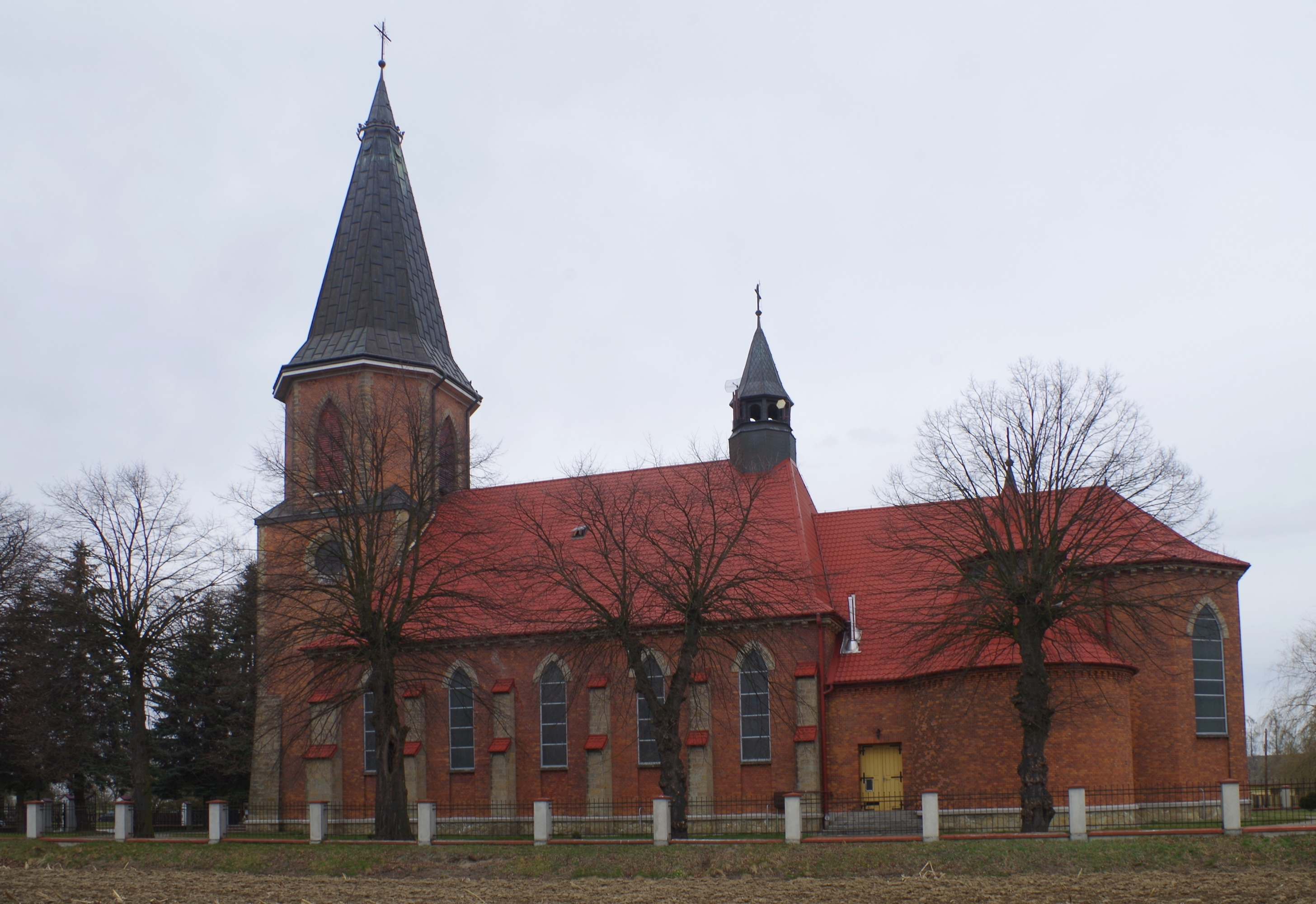 Kościół w Cerekwi